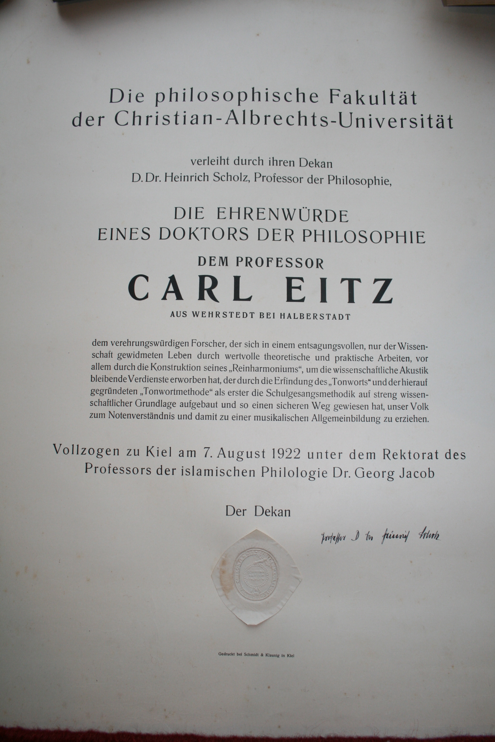 Die Urkunde zur Verleihung der Ehrendoktowürde an der Christian-Albrecht-Universität zu Kiel am 7. August 1922